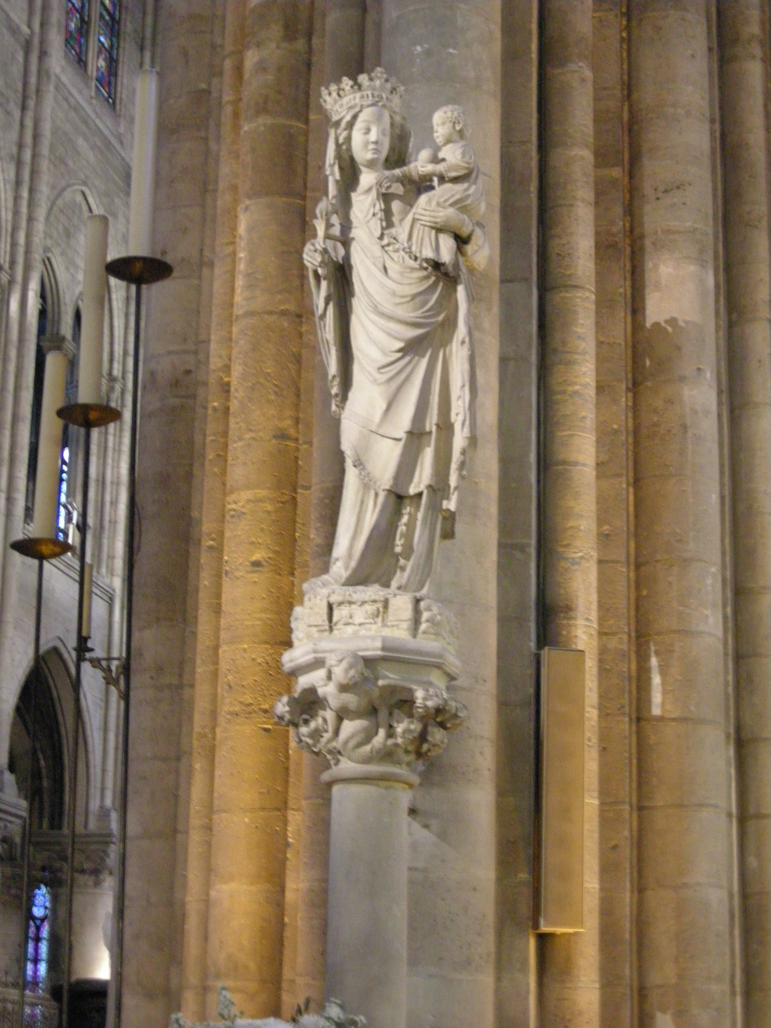 Notre dame de paris, statua della nostra signora di parigi